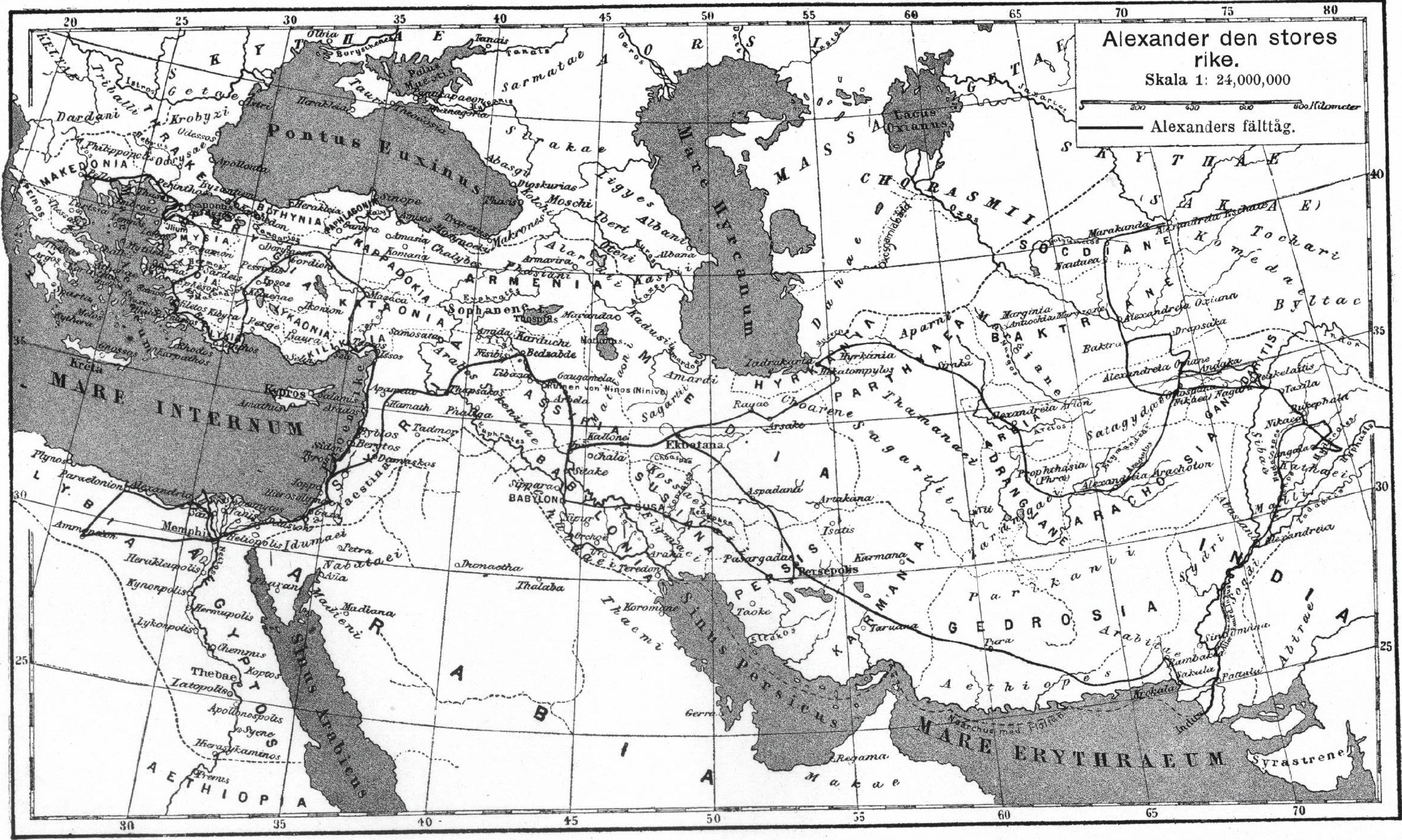 Alexander den stores rike, Nordisk familjebok